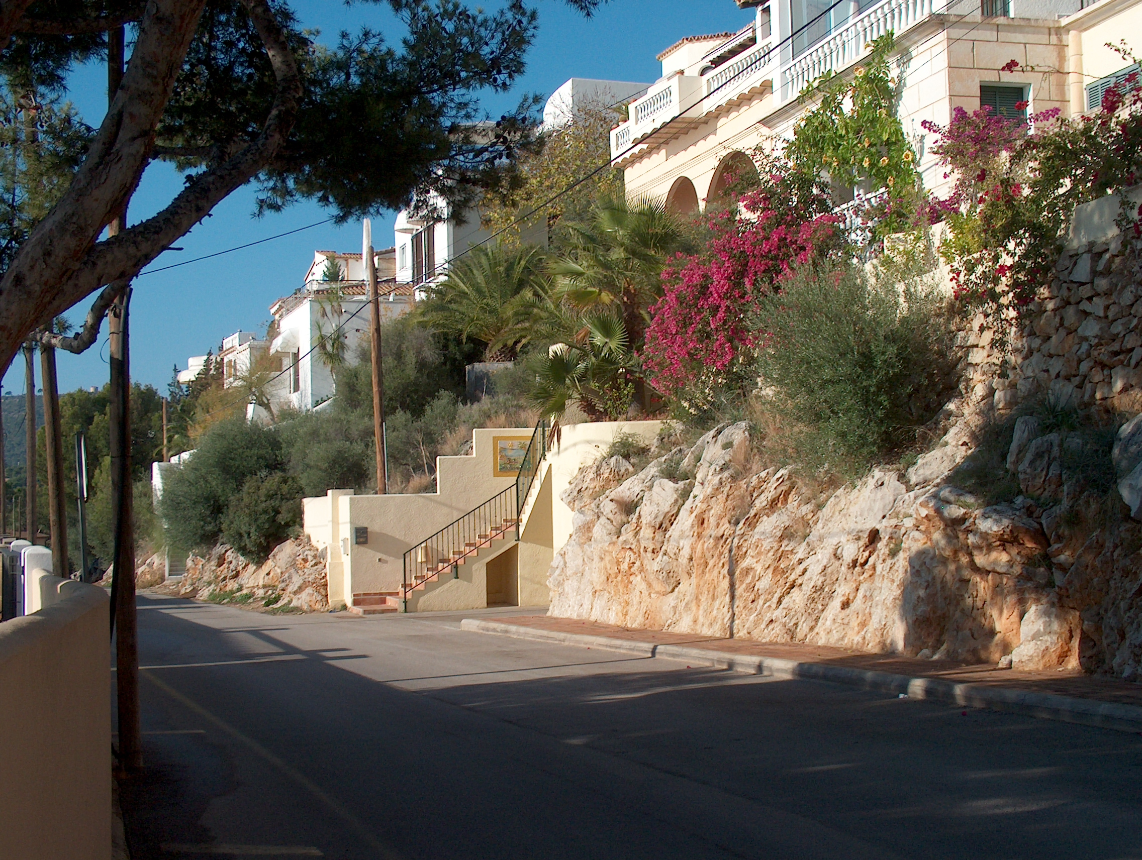 Cala Fornells bei Paguera.